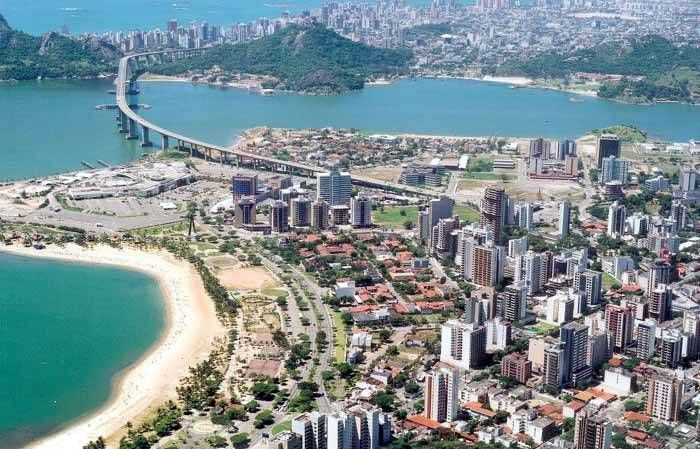 Essa foto mostra a subida da Terceira Ponte, pelo lado de Vitória, tendo em primeiro plano a Curva da Jurema e após a Ponte o Tribunal de Justiça do Espírito Santo, ao fundo o Morro do Convento da Penha, tendo ao seu pé a Prainha de Vila Velha, e após, bem ao fundo a Cidade de Vila Velha e Itaparica.